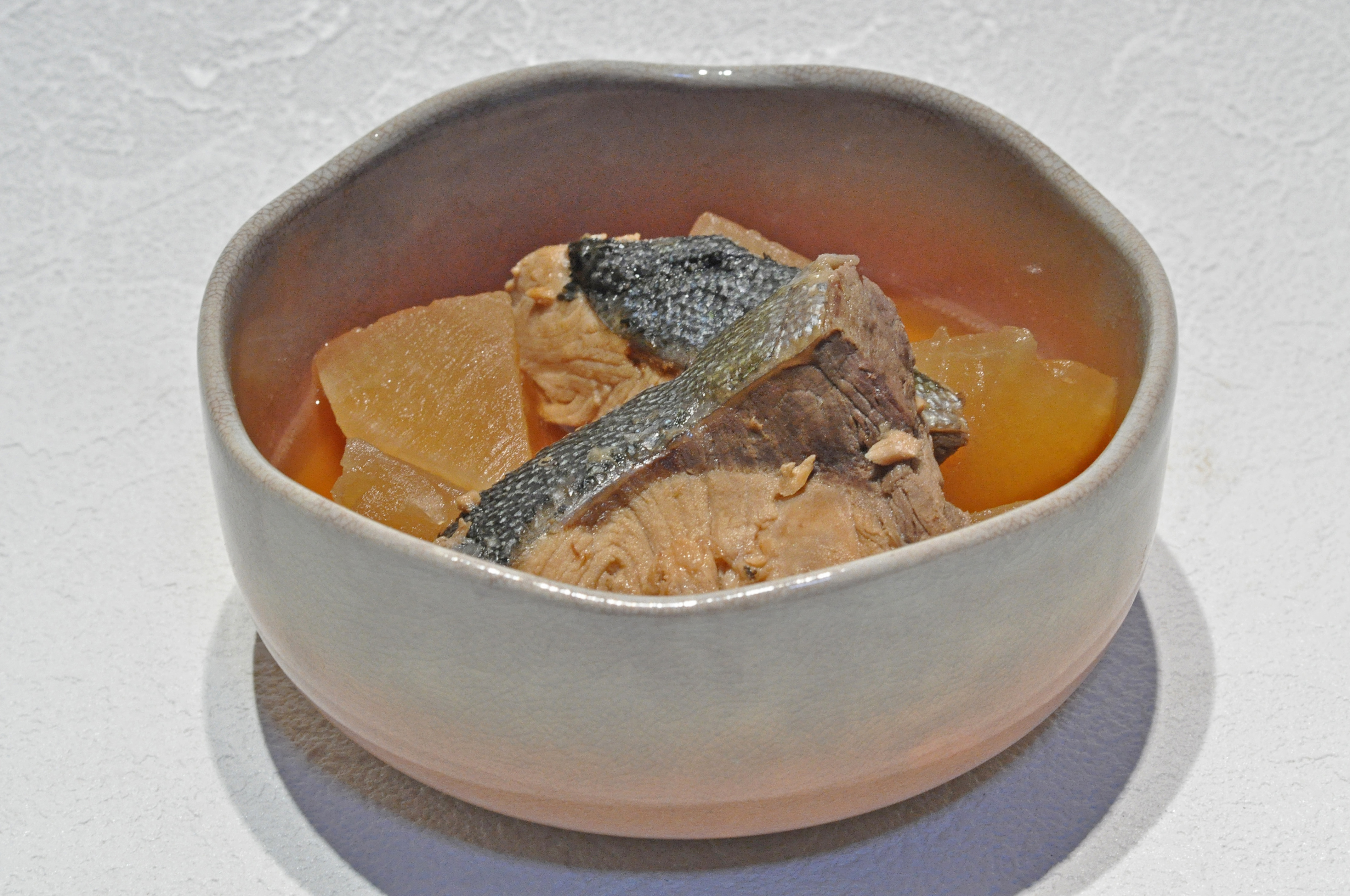 ぶり大根（大根は乱切り）